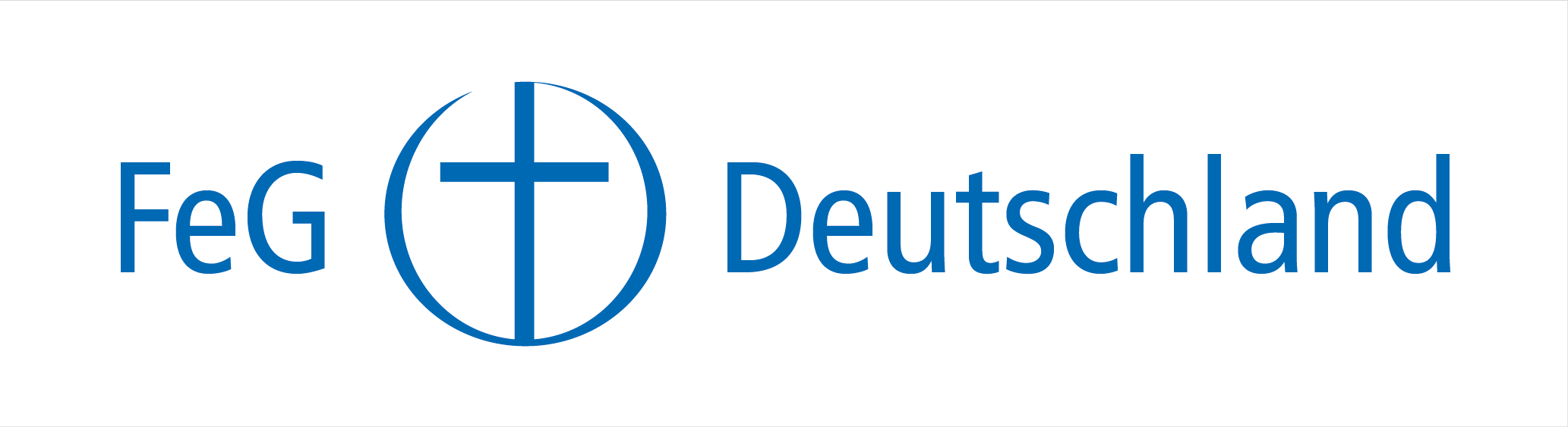 Logo des Bundes Freier evangelischer Gemeinden in Deutschland (KdöR)